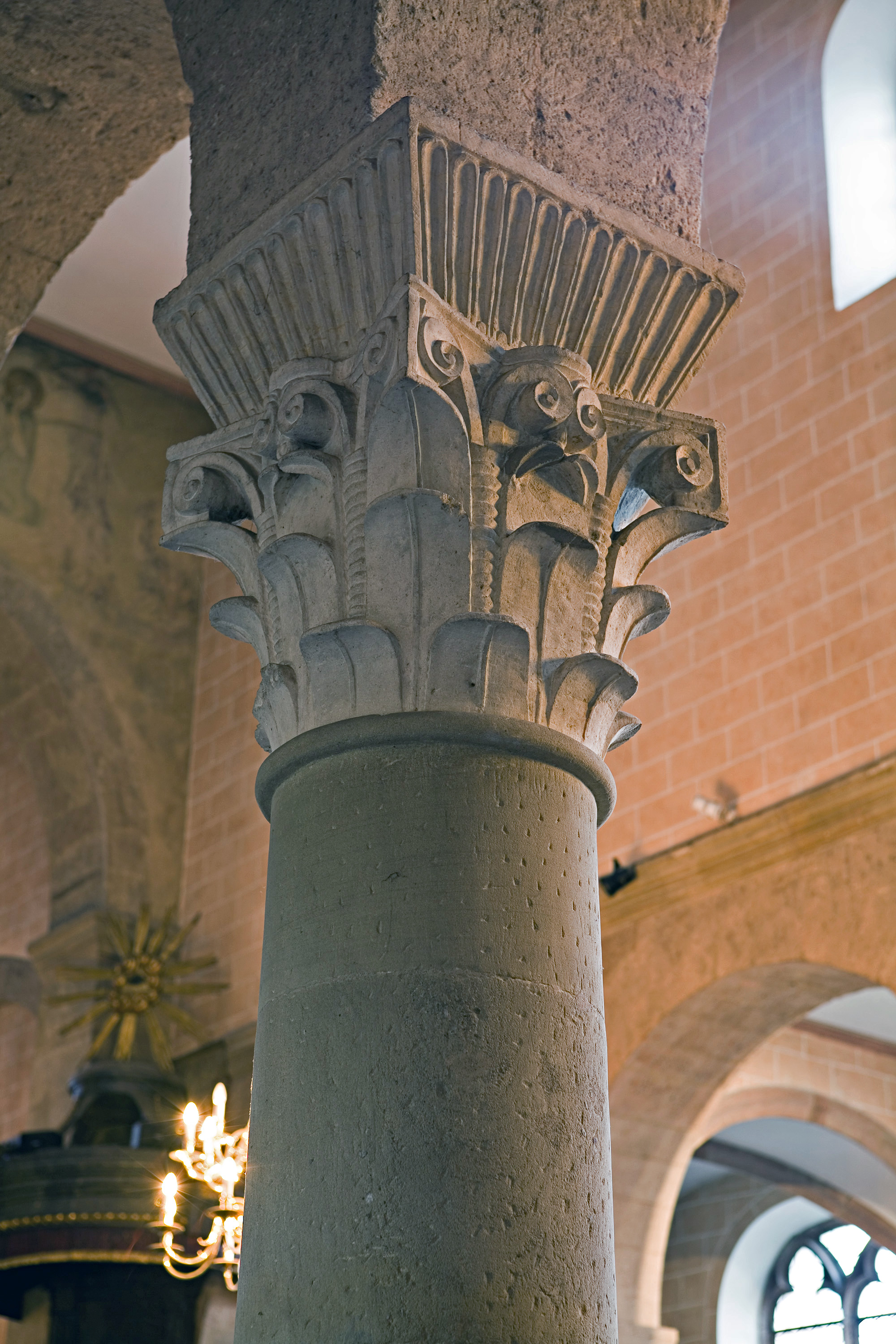 Korinthisch-antikisierendes Kapitell mit Kämpfer in der Justinuskirche in Frankfurt am Main/Höchst. Das Gebäude ist eines von an einer Hand abzuzählenden in Deutschland, in dem sich vollständig karolingischer Zeit entstammende Arkaden mit entsprechendem Säulenschmuck erhalten haben, der auf um 800 datiert wird. Selber fotografiert im Oktober 2006, daher gemeinfrei.